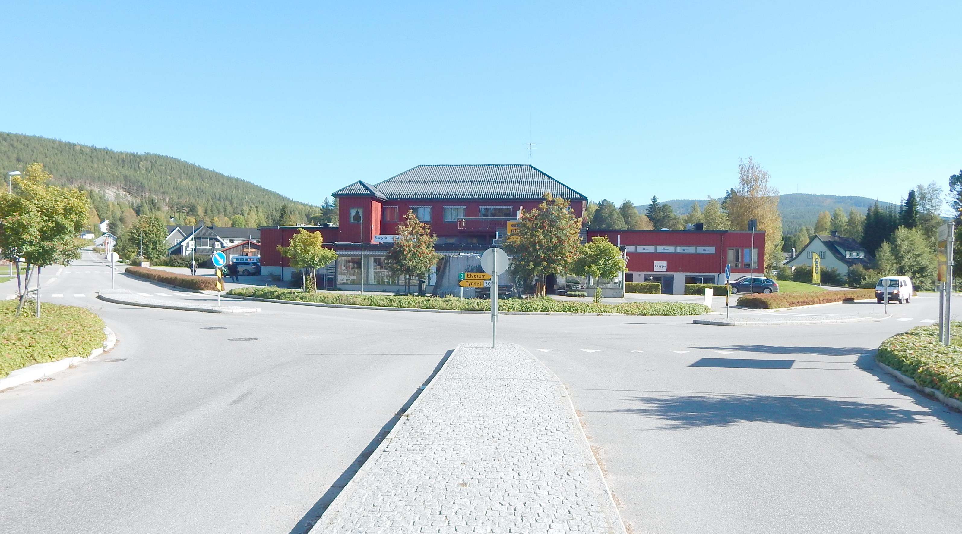 Storgata på Koppang